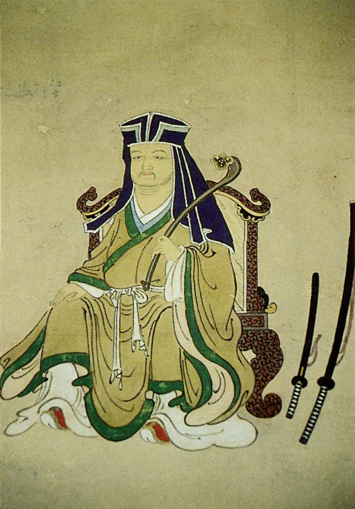 多久安順の肖像。